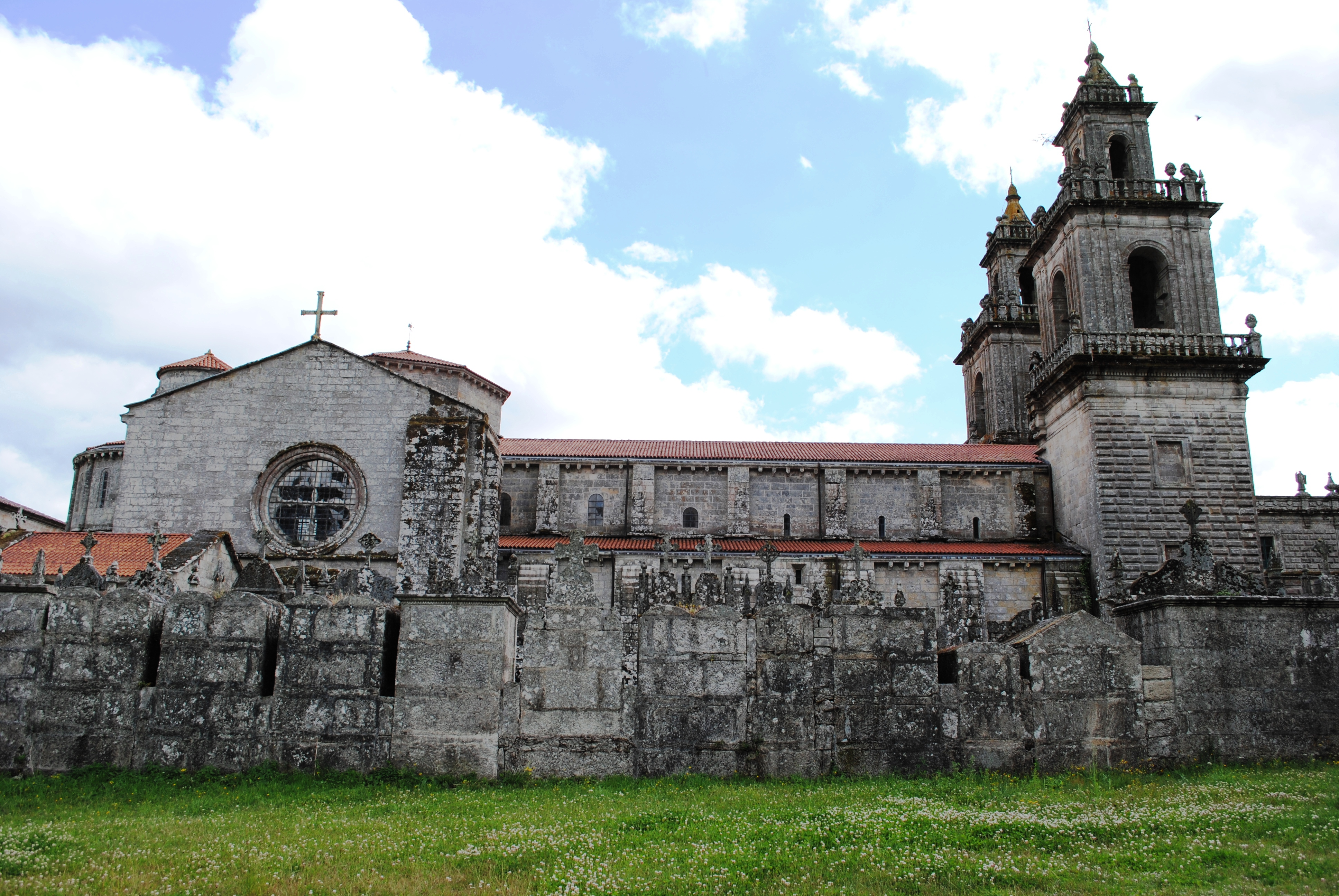 Mosteiro de Oseira, igrexa.JPG